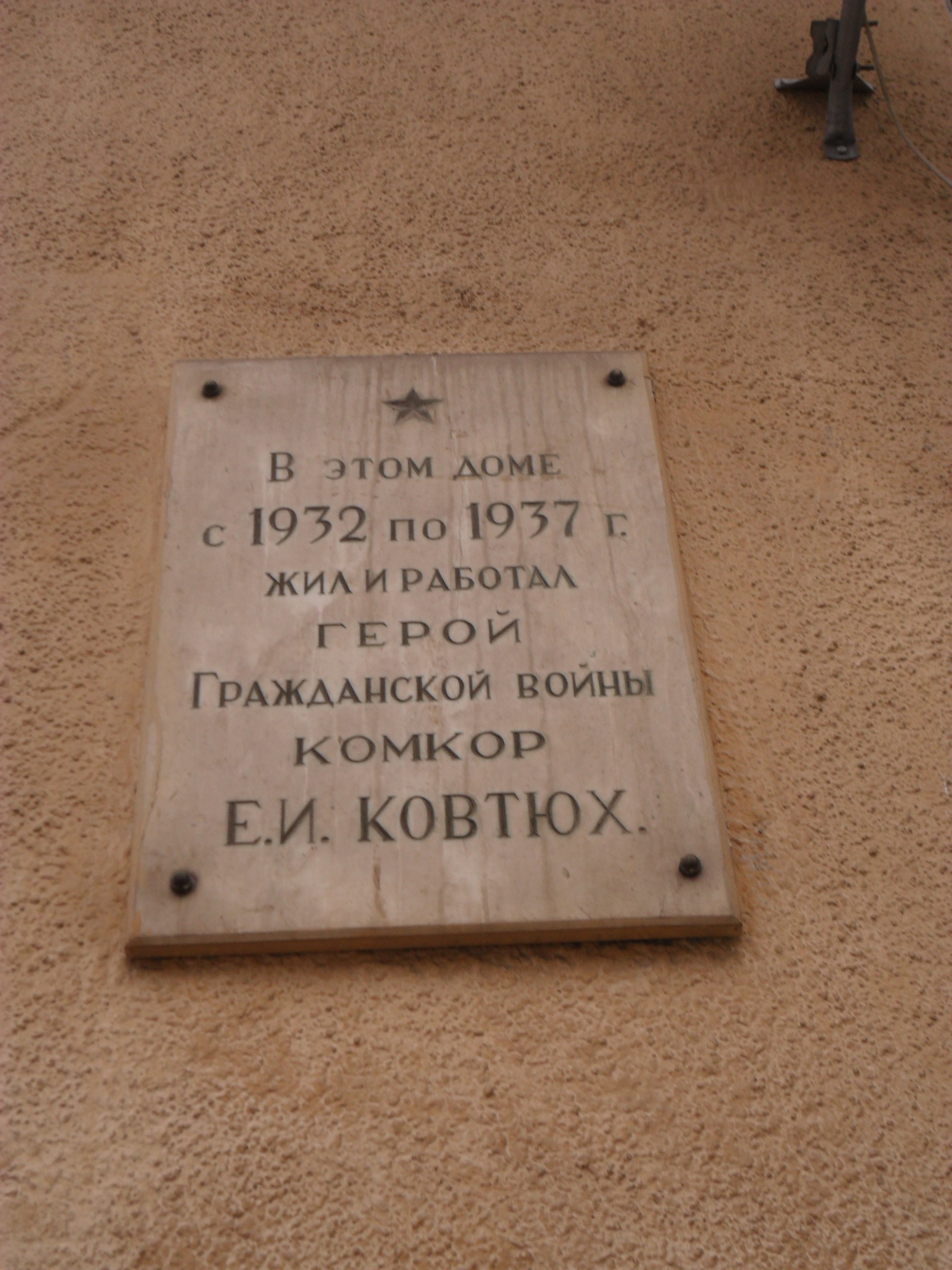 Мемориальная доска комкору Епифану Ковтюху (старая) на улице Коммунистической в Смоленске.